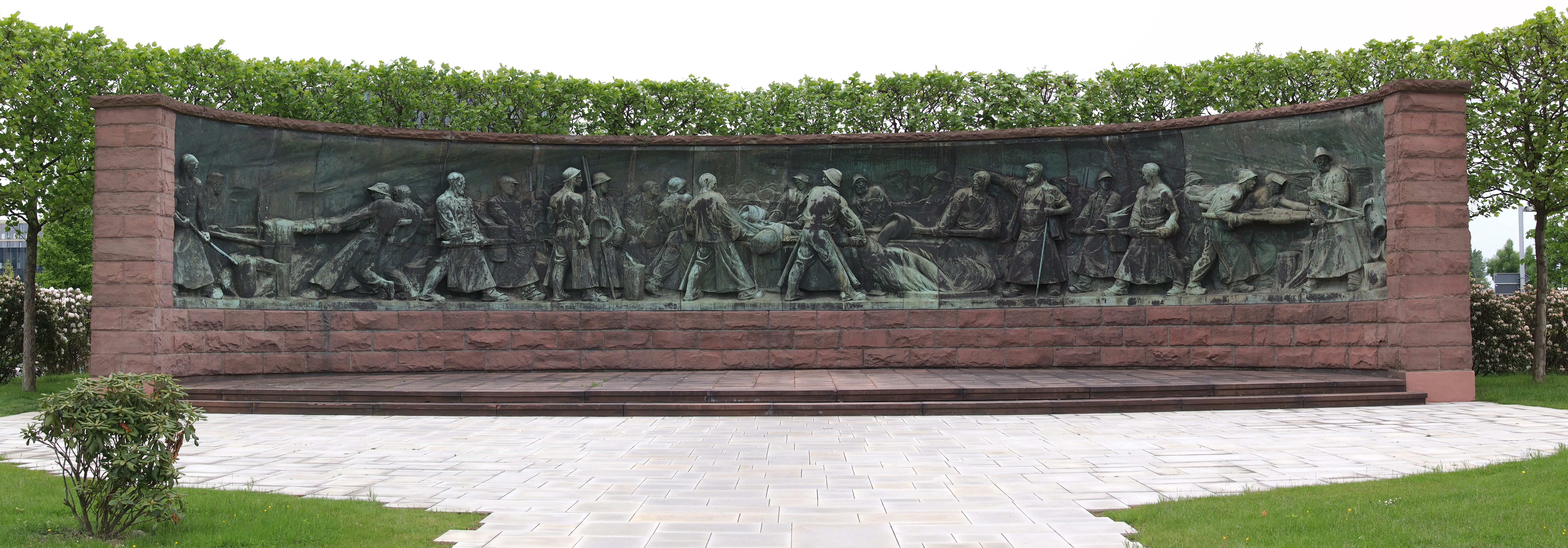 Das Kruppsche Tiegelgussdenkmal im ThyssenKrupp Quartier, Altendorfer Straße in Essen, Panoramabild aus acht Einzelbildern